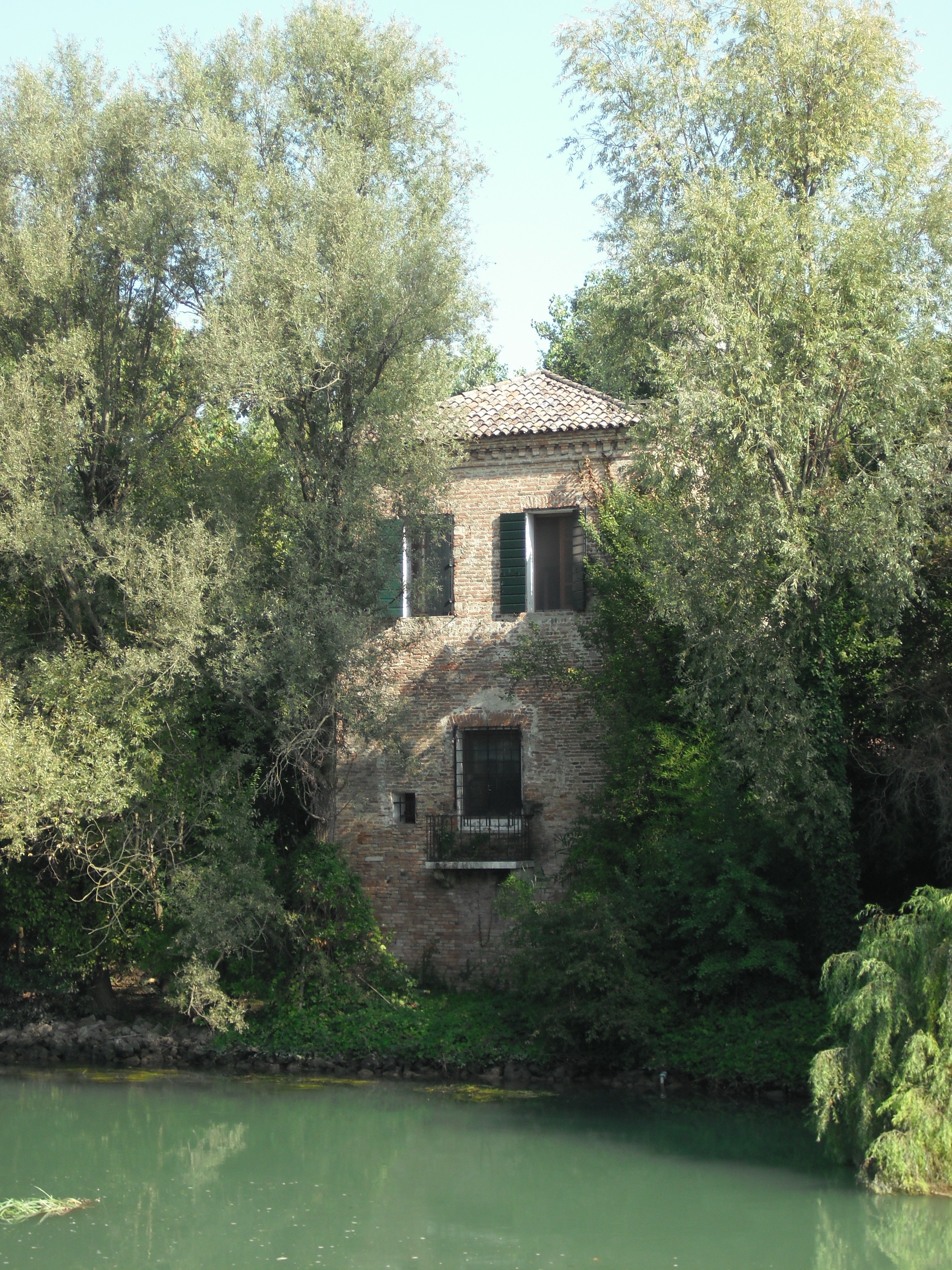 Torre di Musestre.